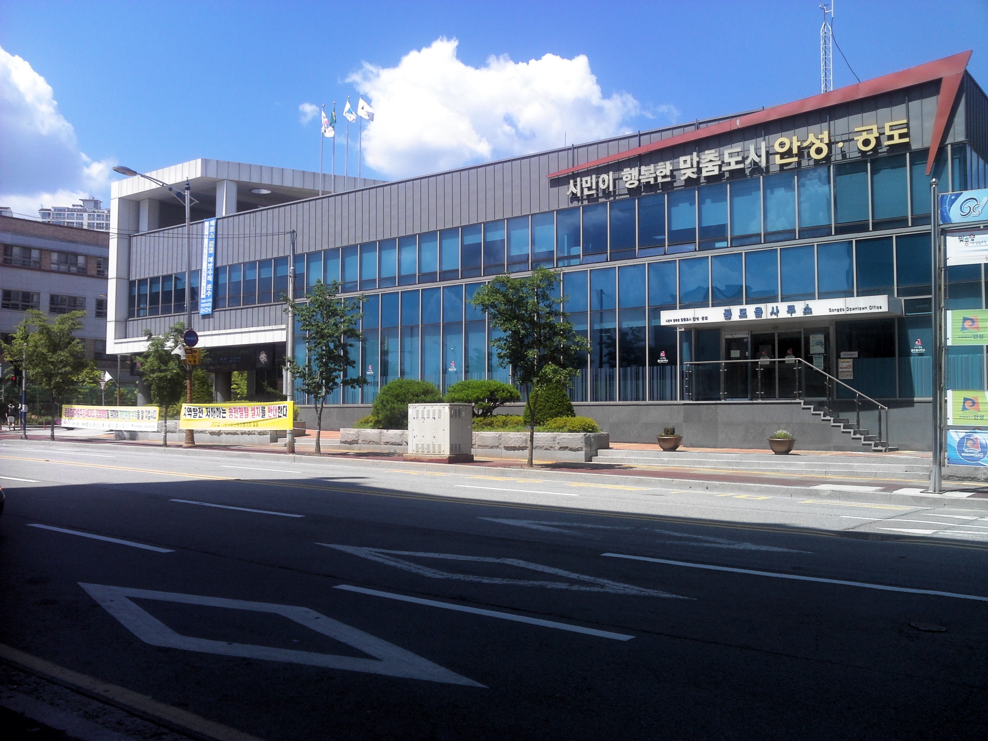 안성시 공도읍사무소